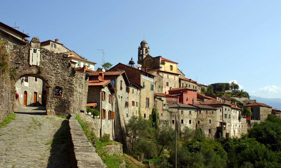 Veduta del borgo di Mulazzo (MS)